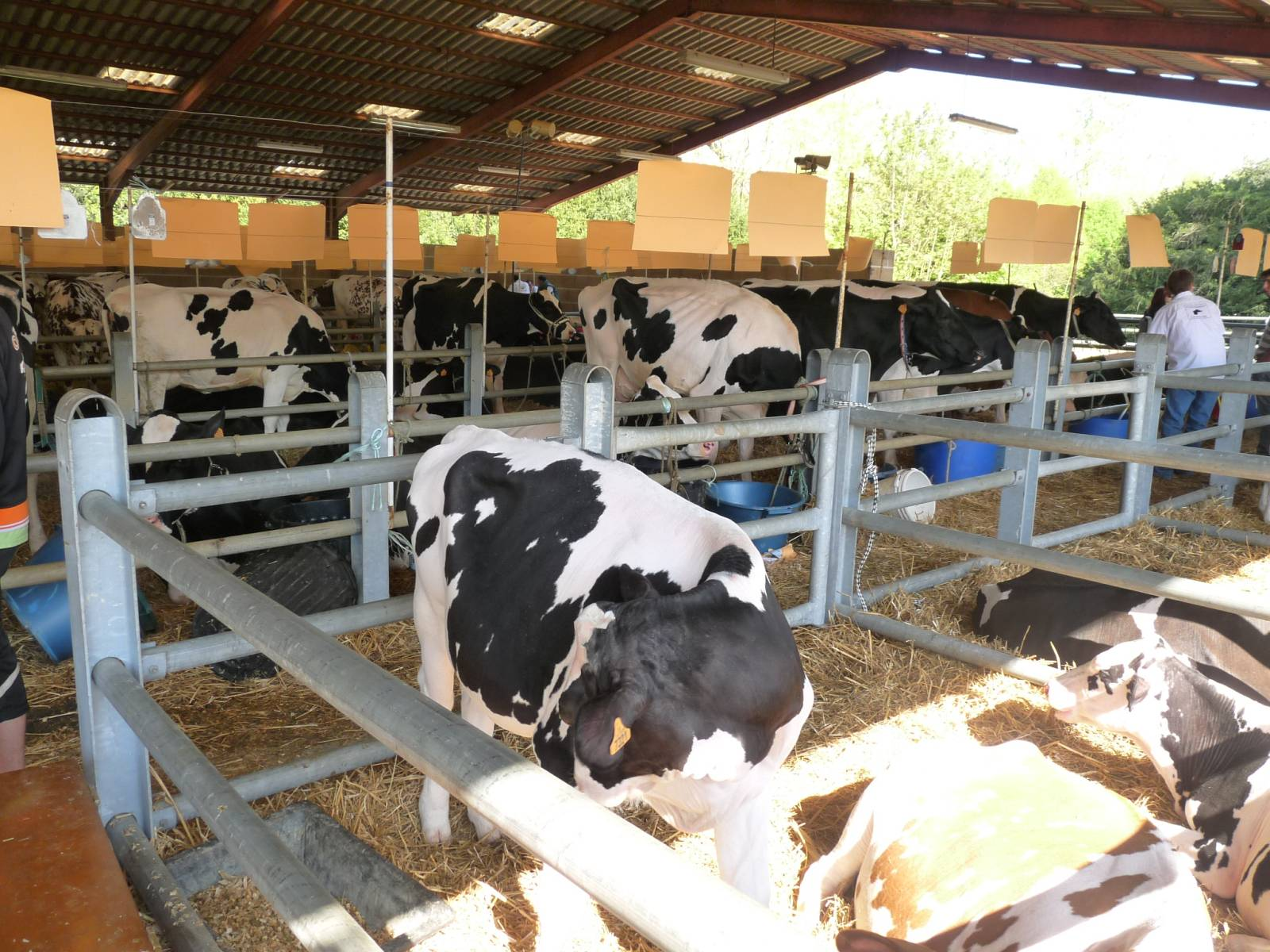 Marché aux bestiaux, Chabanais, Charente, France